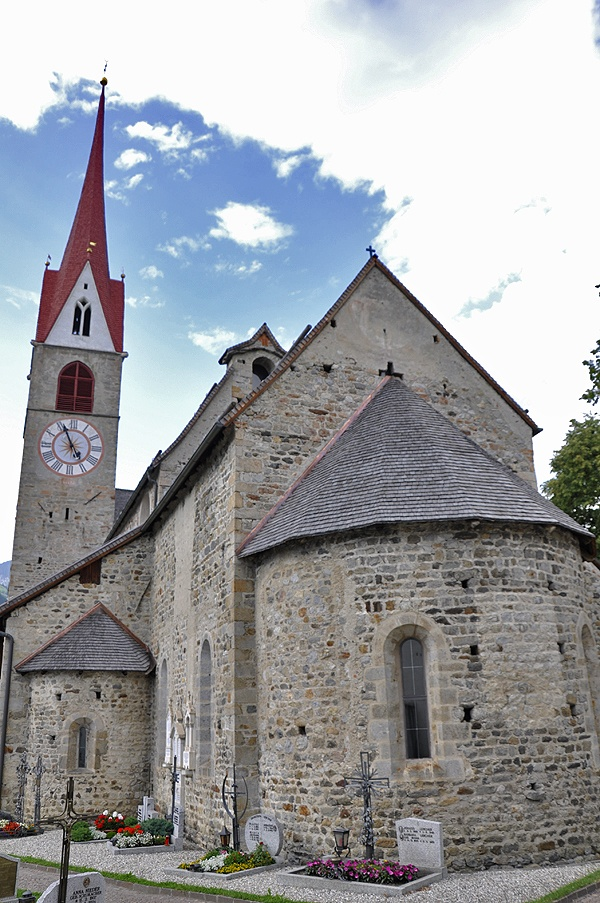 Pfarrkirche zum heiligen Johannes dem Evangelisten in Gais